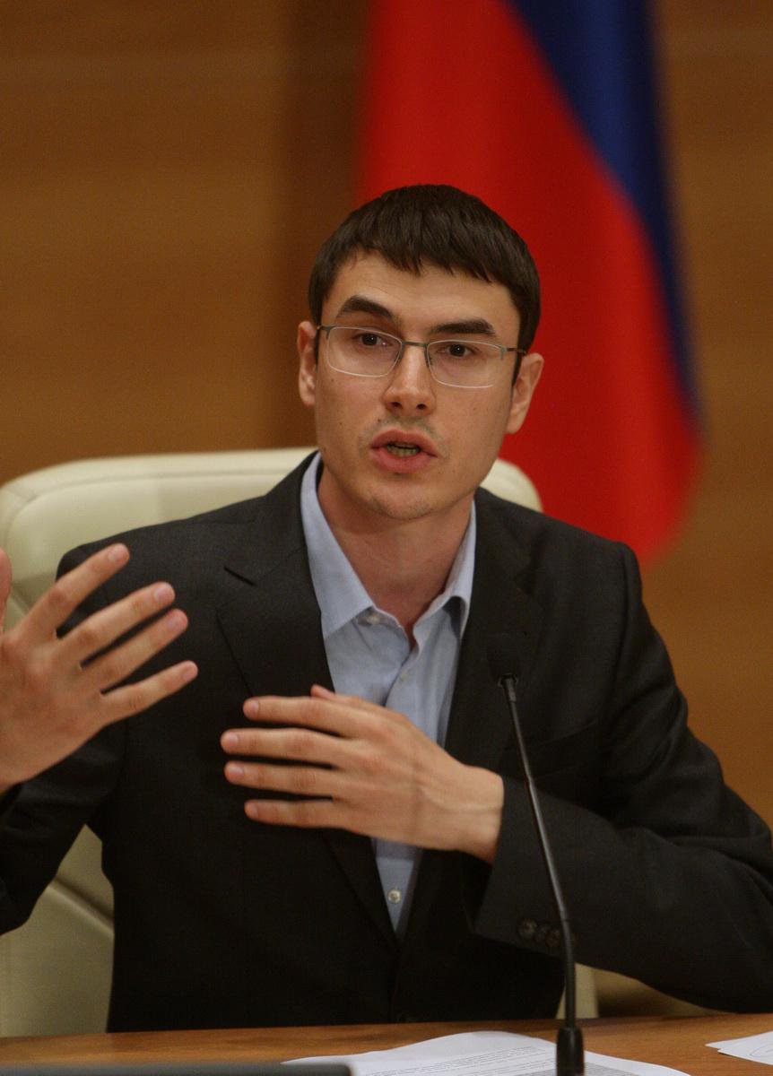 Лекция писателя Сергея Шаргунова в рамках цикла лекций "Литература из первых уст".